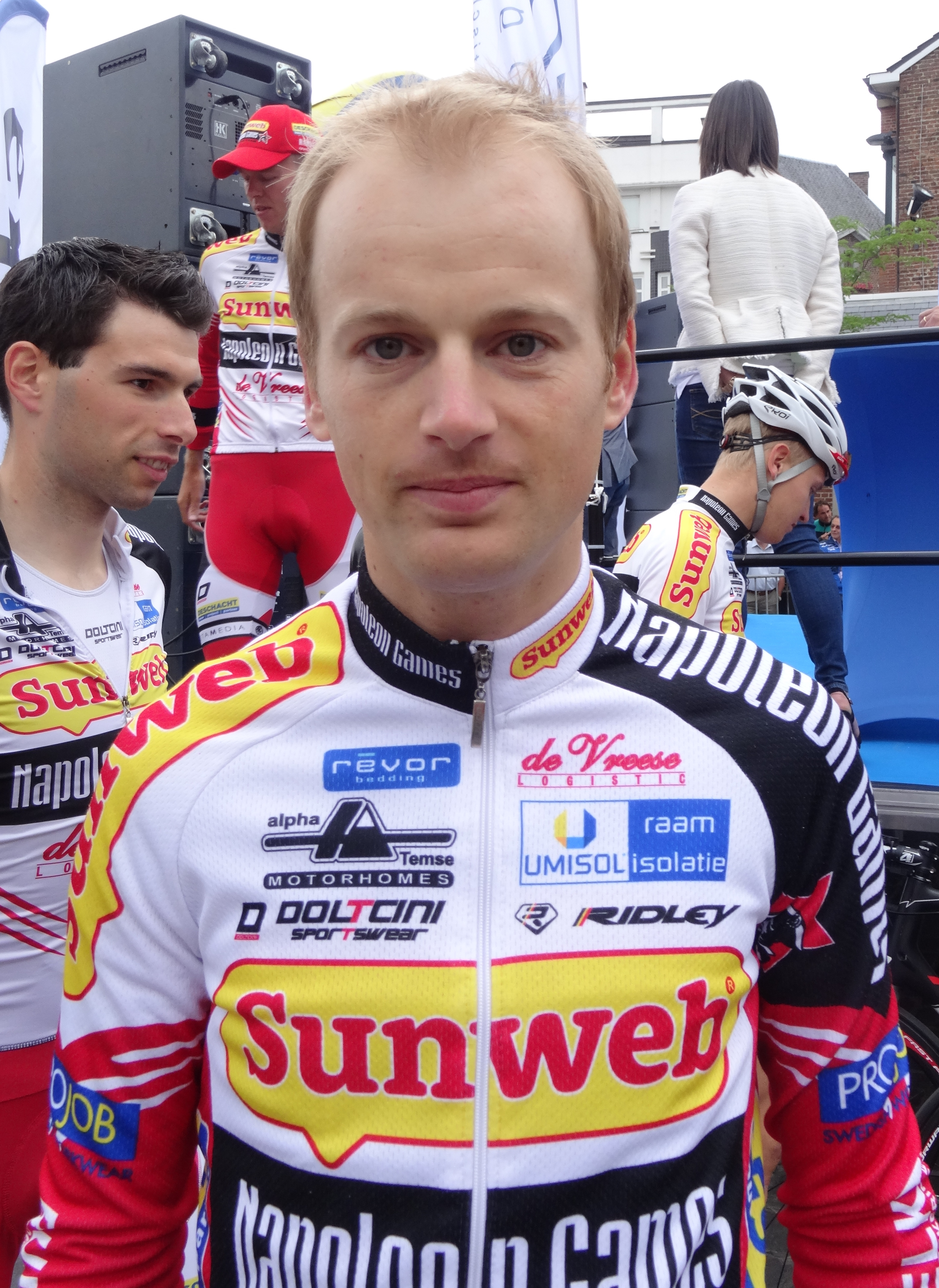 Reportage photographique réalisé le dimanche 15 juin à l'occasion du départ et de l'arrivée du Tour du Limbourg 2014 à Tongres, Belgique.